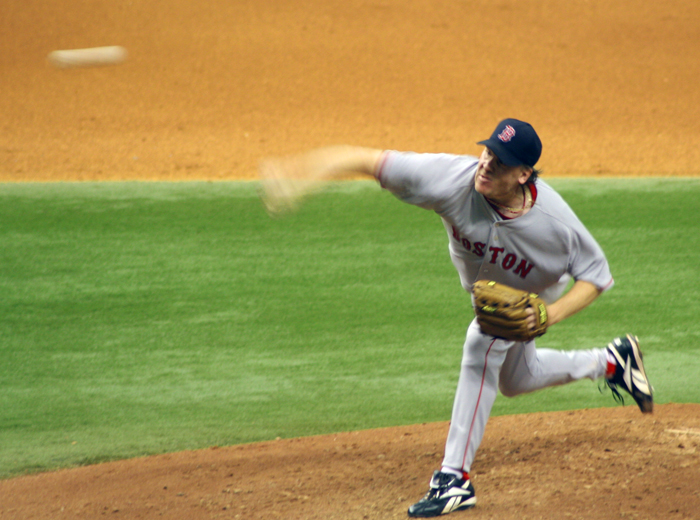 Photo taken by Googie Man 20:40, 30 April 2006 . . Googie man . . 700×520 (342,985 bytes)